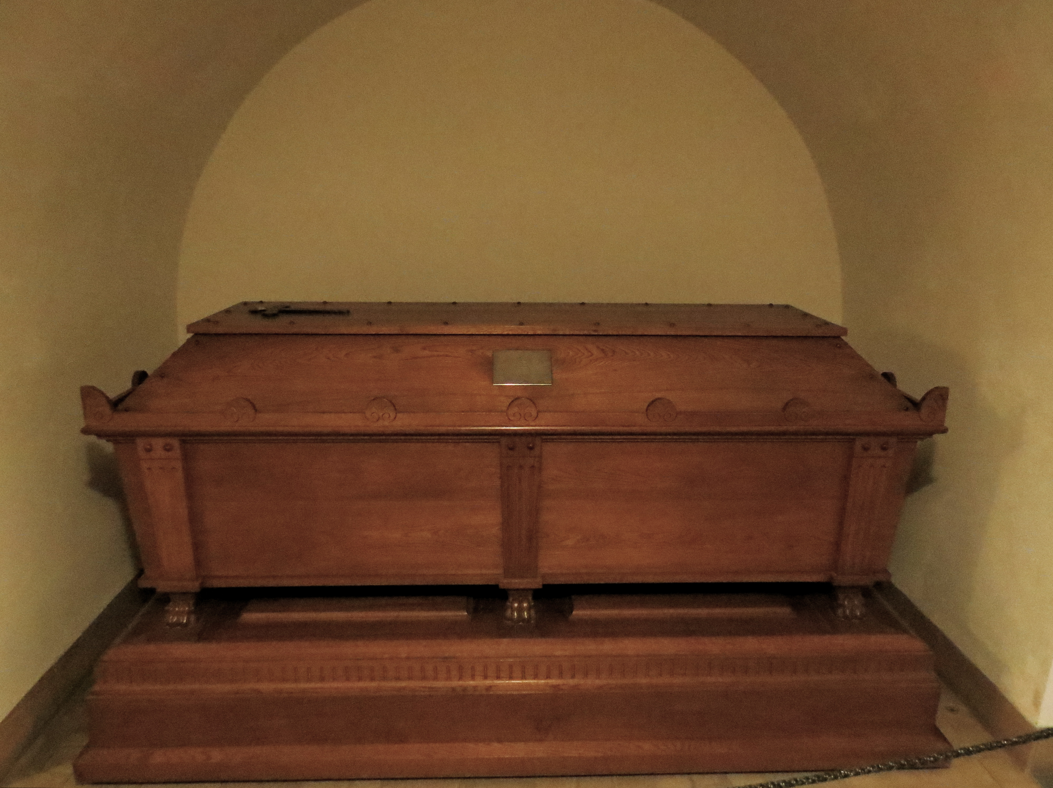 Hendes Højhed Prinsesse Viggos (1895-1966) sarkofag i Christian VIs krypt under Frederik Vs kapel i Roskilde Domkirke, Sjælland